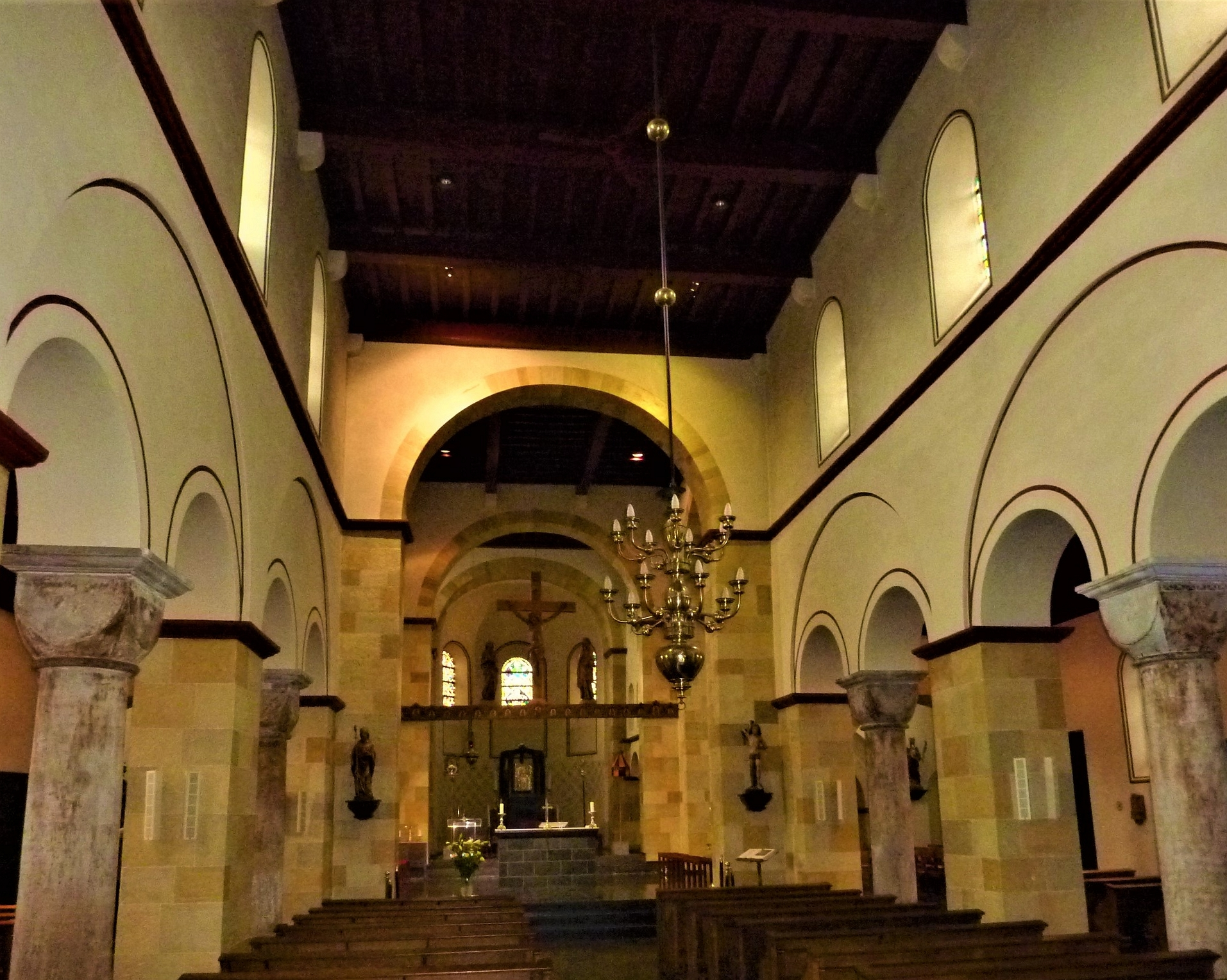 Sint-Amelbergabasiliek, Susteren